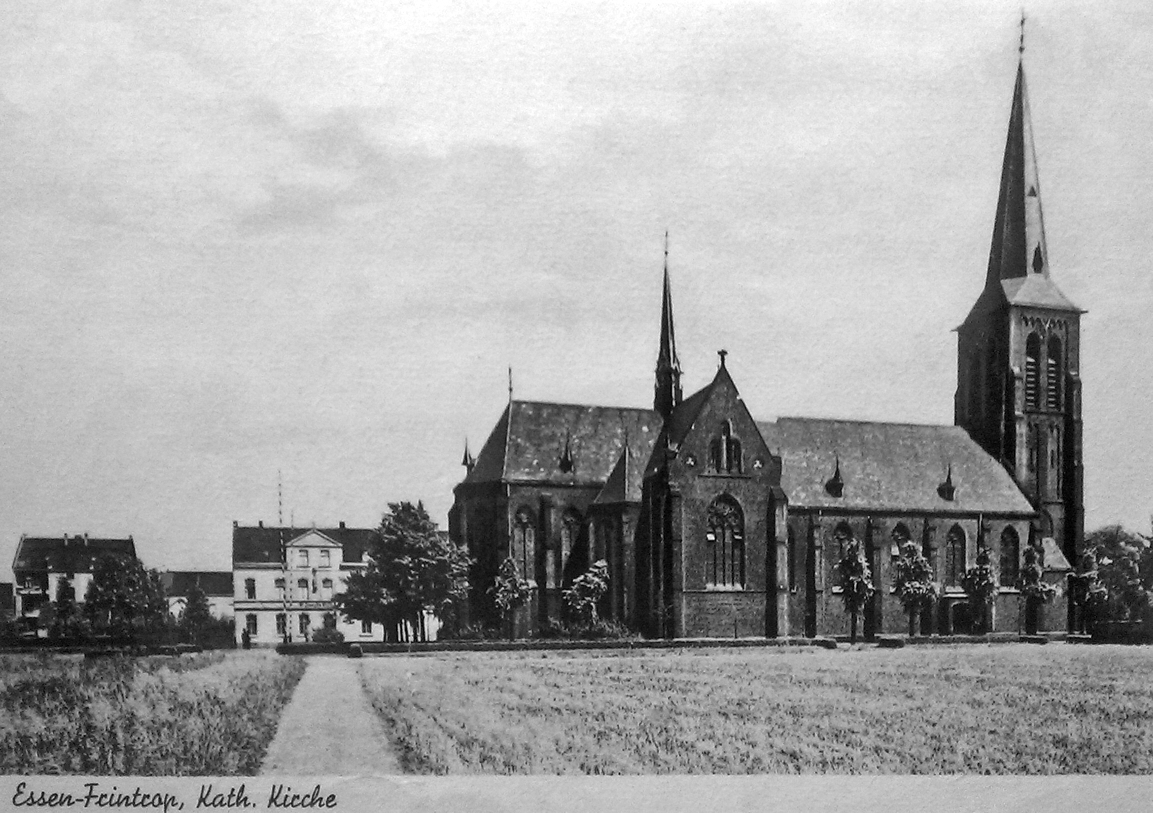 Ansichtskarte: St.-Josef-Kirche in Essen-Frintrop